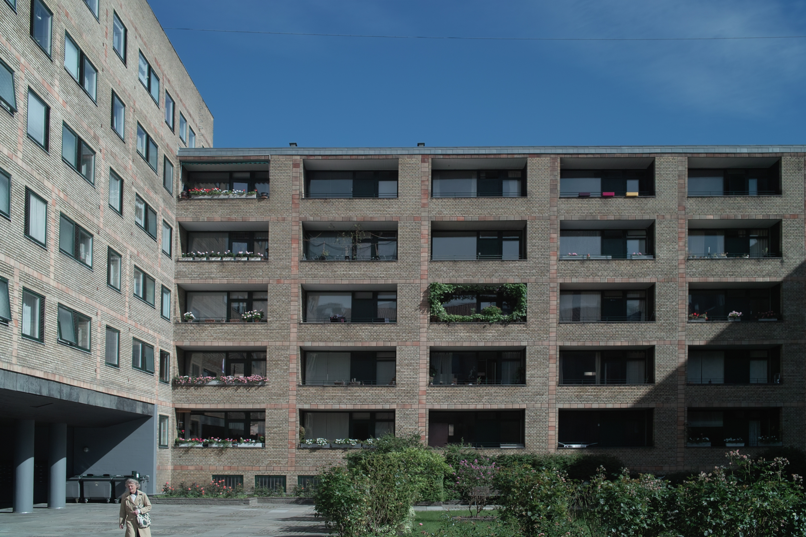 Borgergården housing in central Copenhagen, Denmark